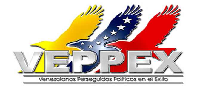 Veppex New York